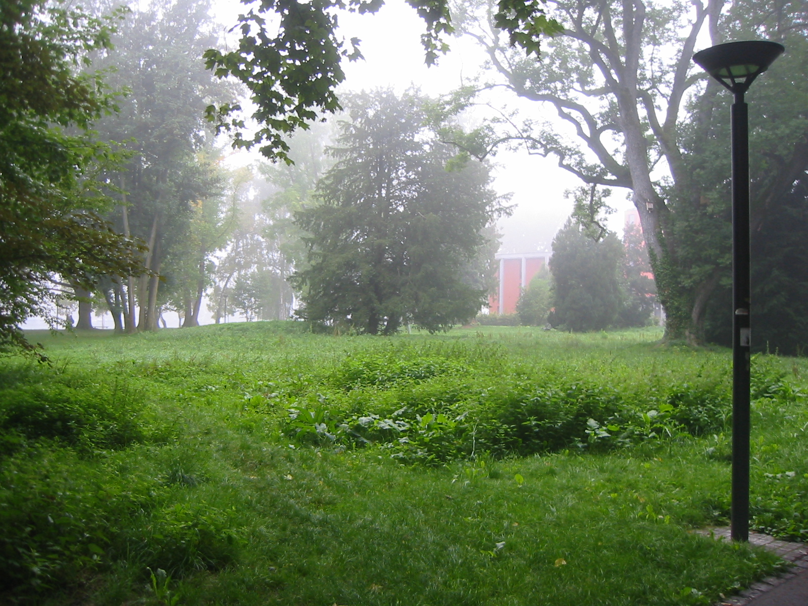 Herosé-Park in Konstanz-Petershausen (Bodensee)